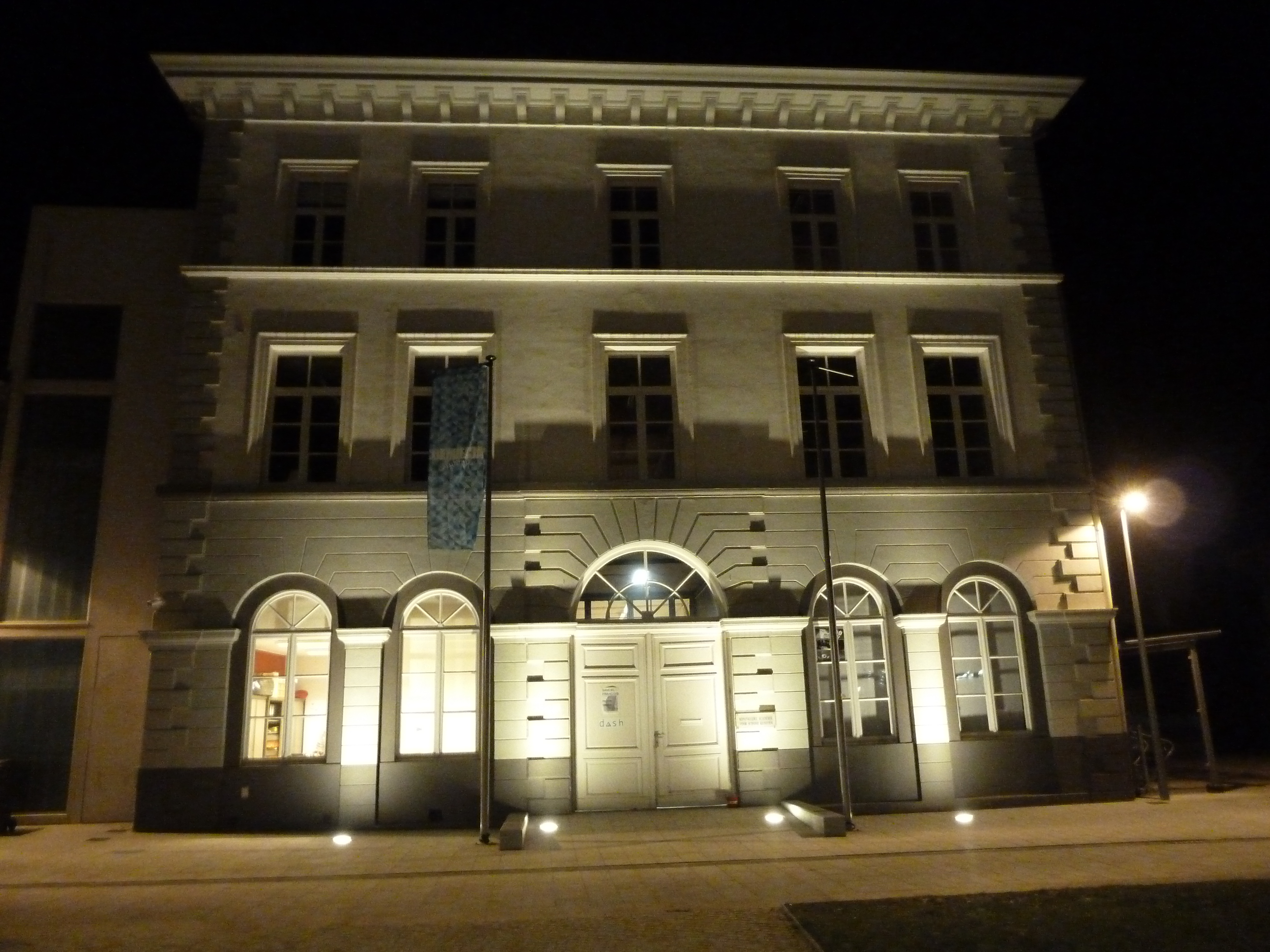 Gevel KASK Kortrijk